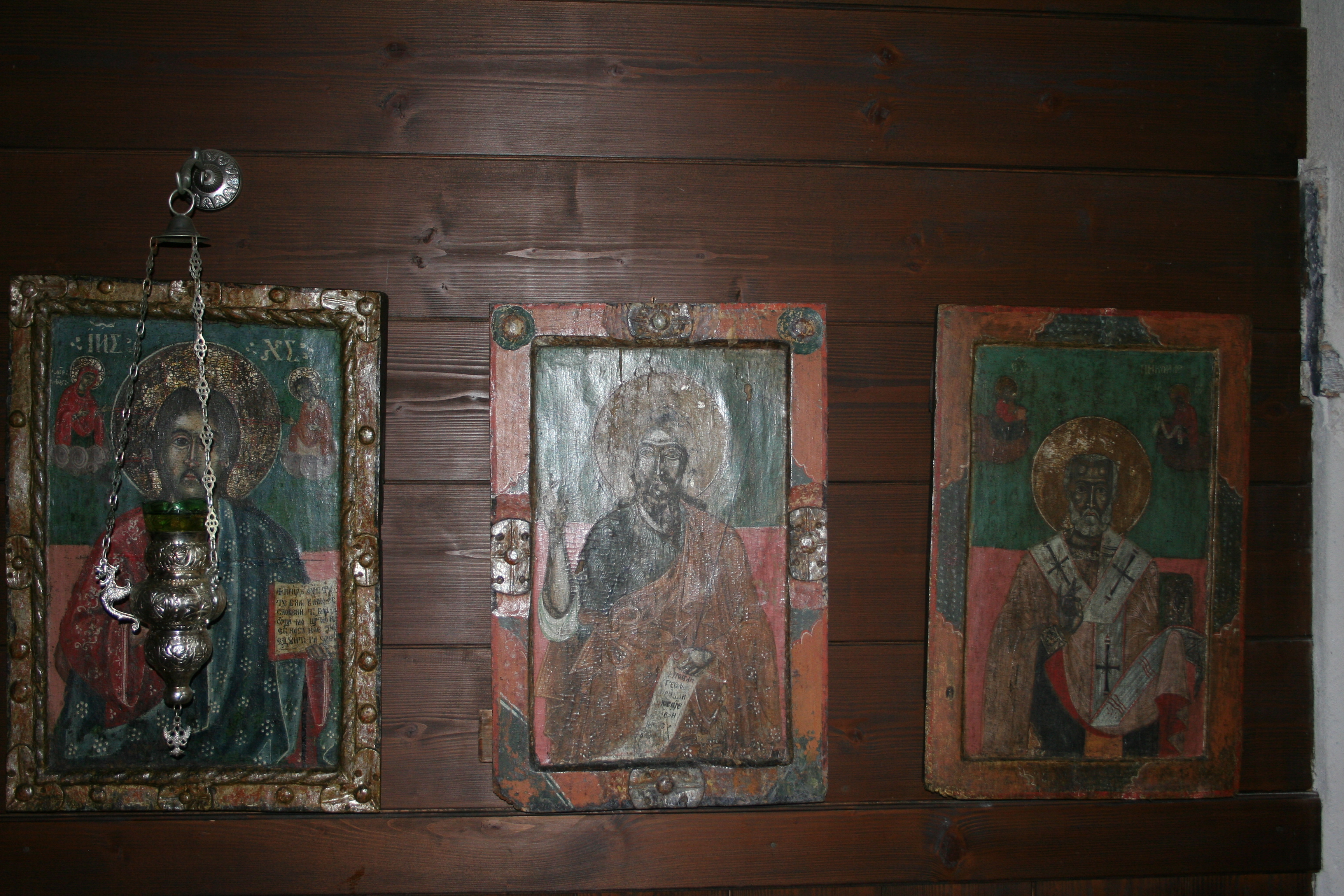 Crkva Svetih apostola Petra i Pavla u Sirogojnu